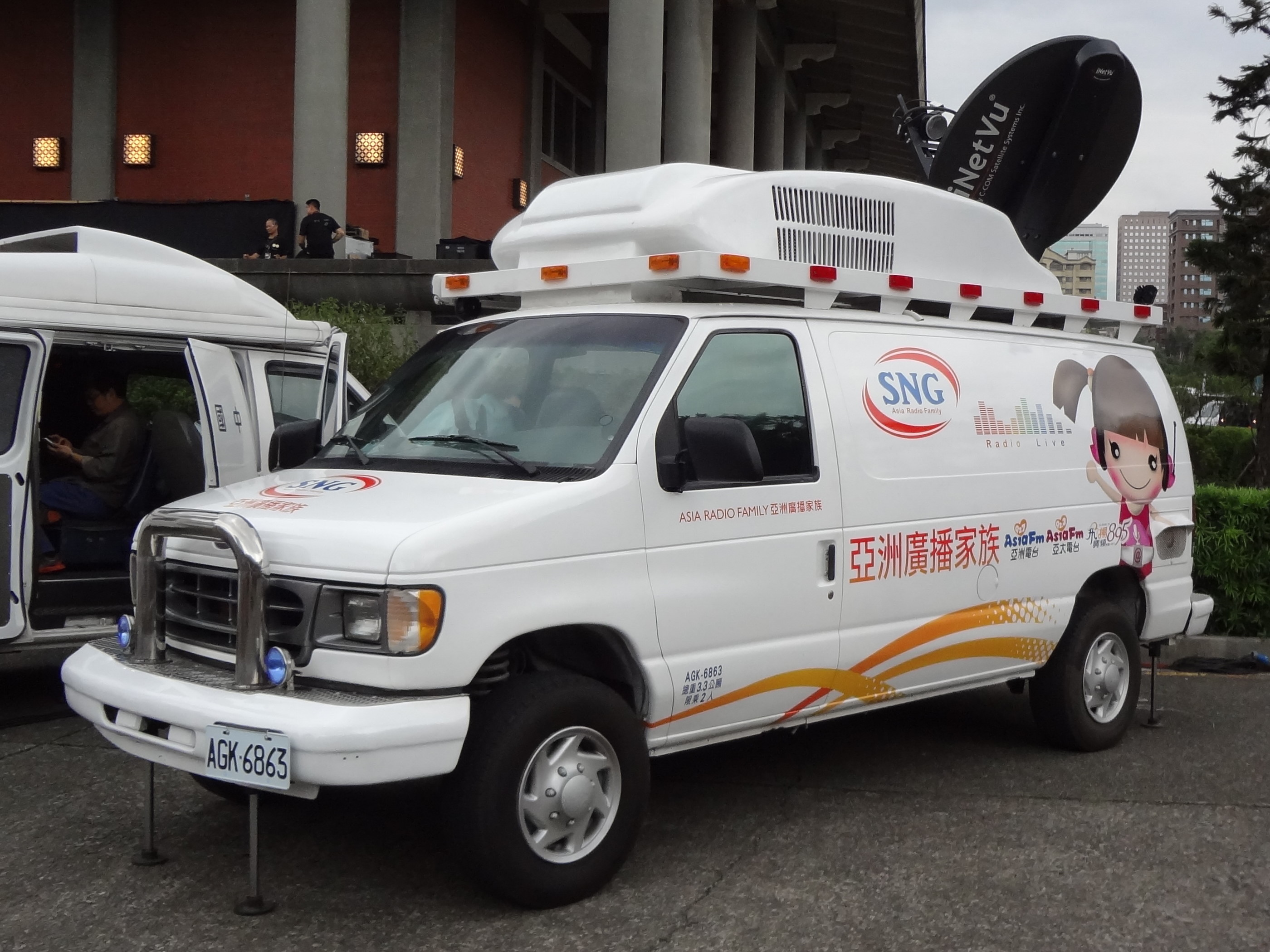 2015年（中華民國104年）第50屆金鐘獎電視金鐘獎星光大道，亞洲廣播網轉播車AGK-6863。